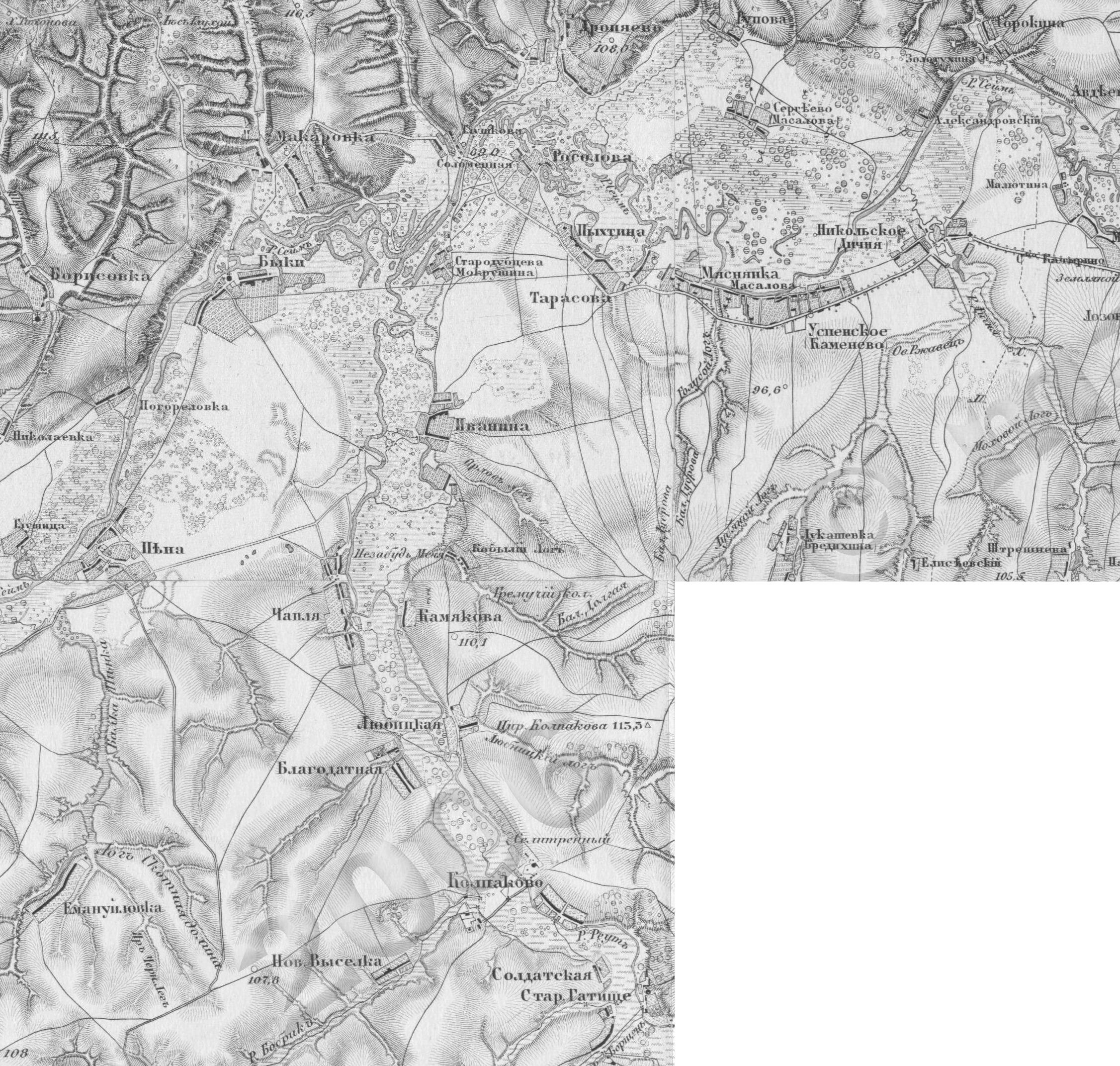 Карта части Льговского уезда